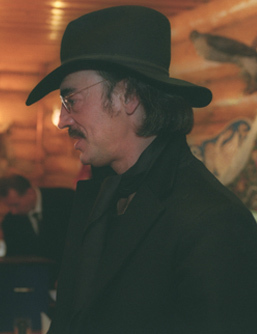 Михаил Боярский.